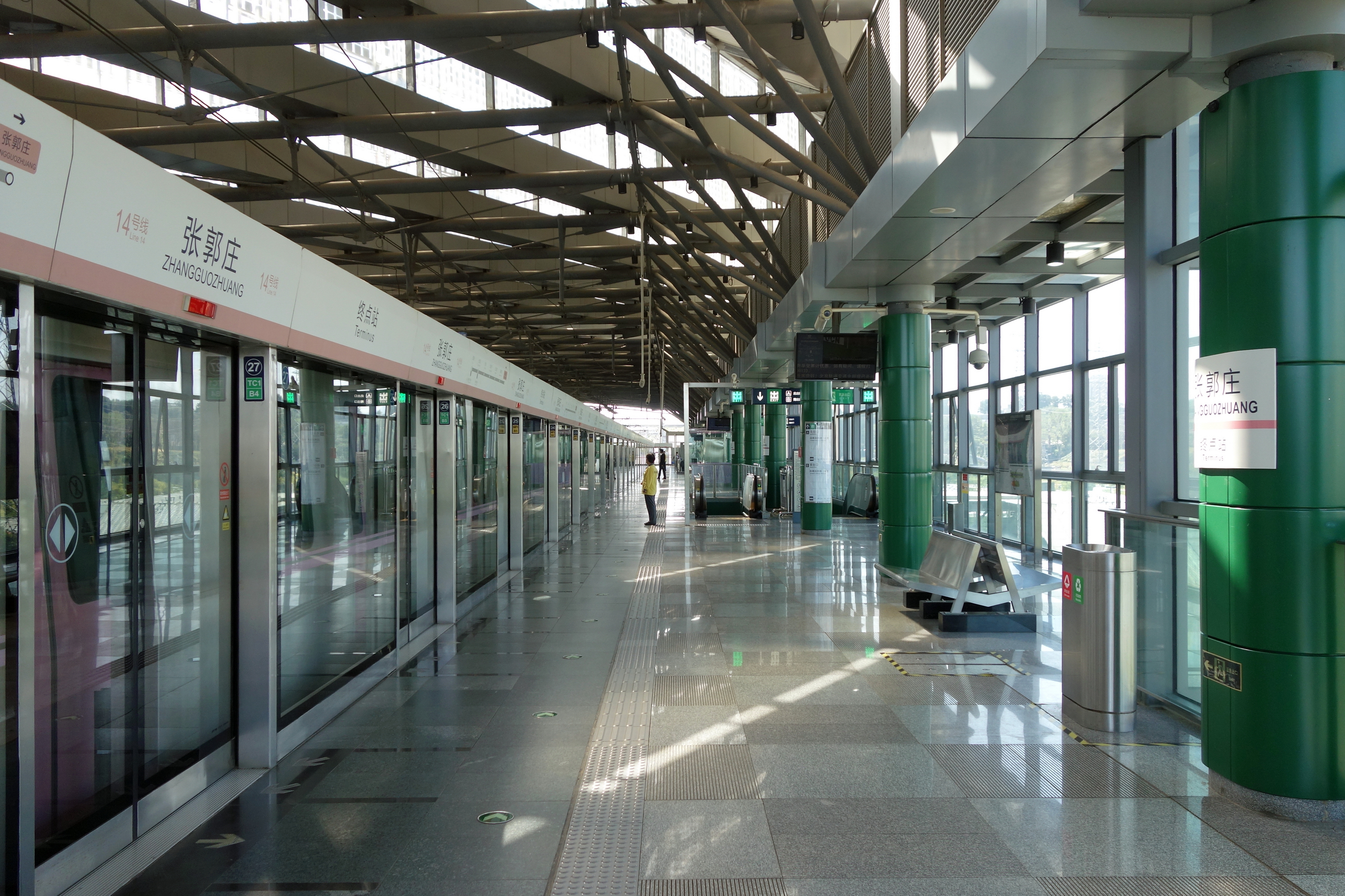 北京地铁14号线张郭庄站高架侧式站台